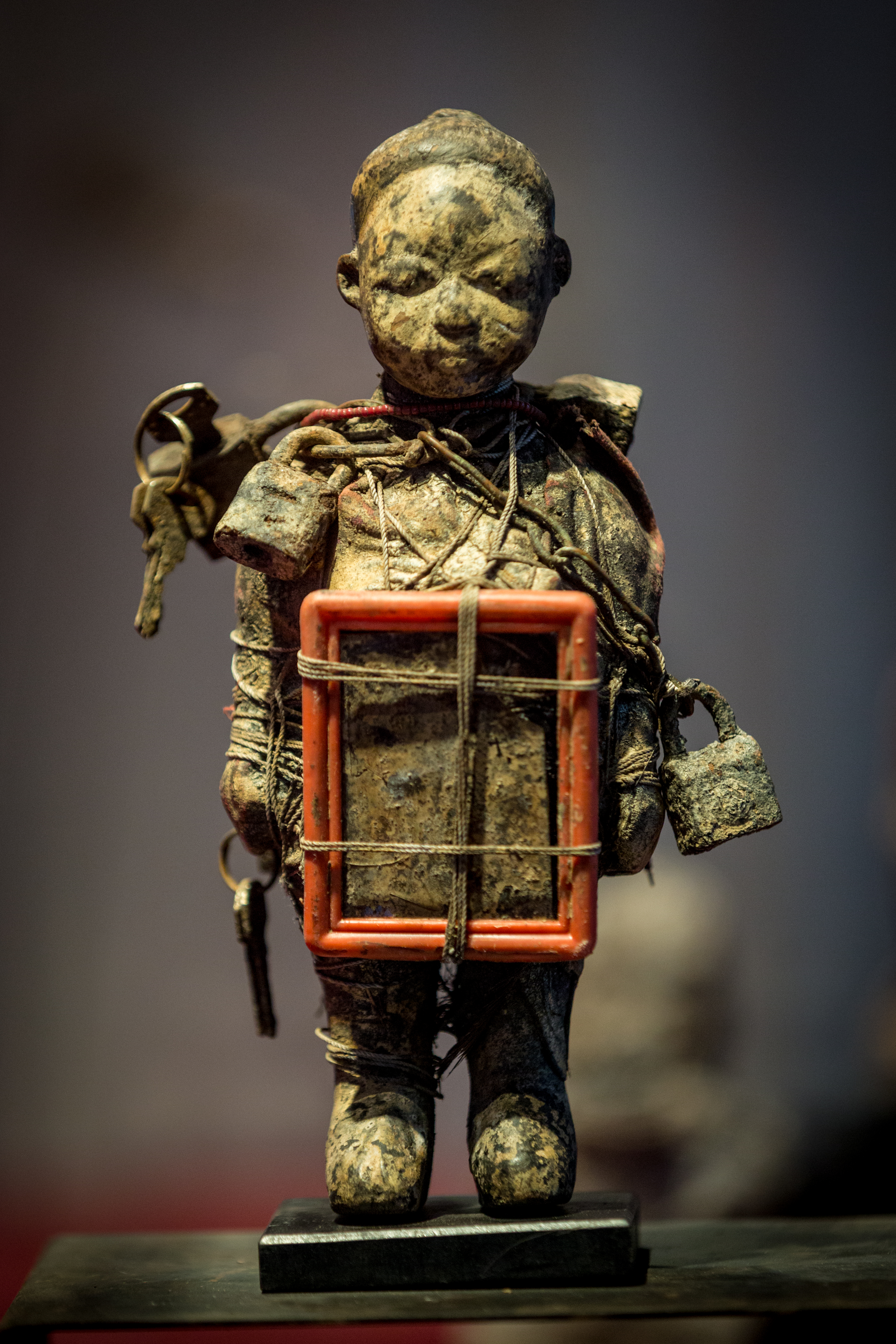 Musée Vodou collection Arbogast Strasbourg mai 2014. Statuette Wutuji bocio. Population Ewé, Togo, seconde moitié du 20e siècle. Bois, herbes, plumes, perles, clés, cadenas, chaîne, Kaolin, corde, étoffe, perles, matières sacrificielles.